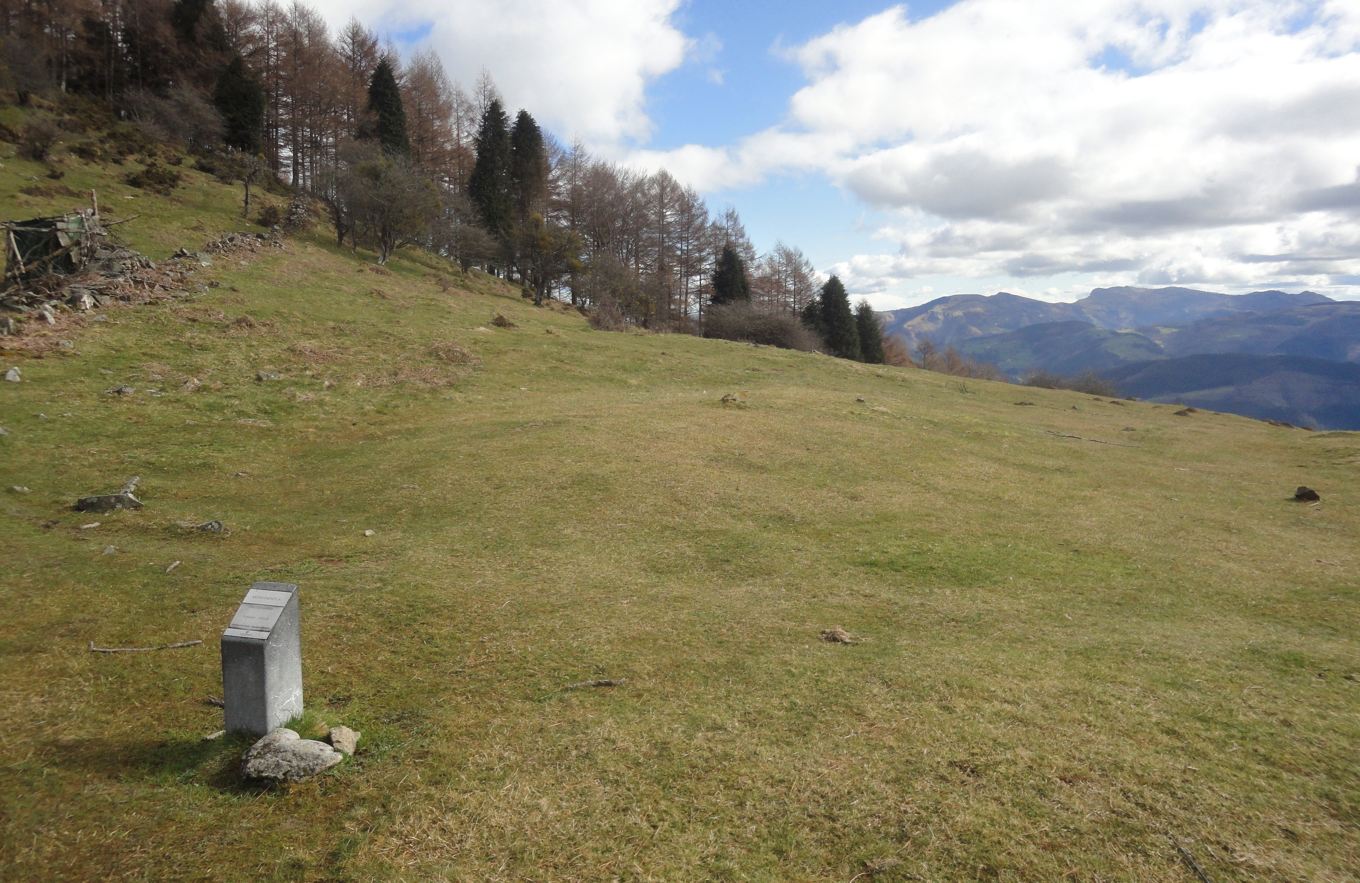 Pagobakarra tumulua - Zumarraga